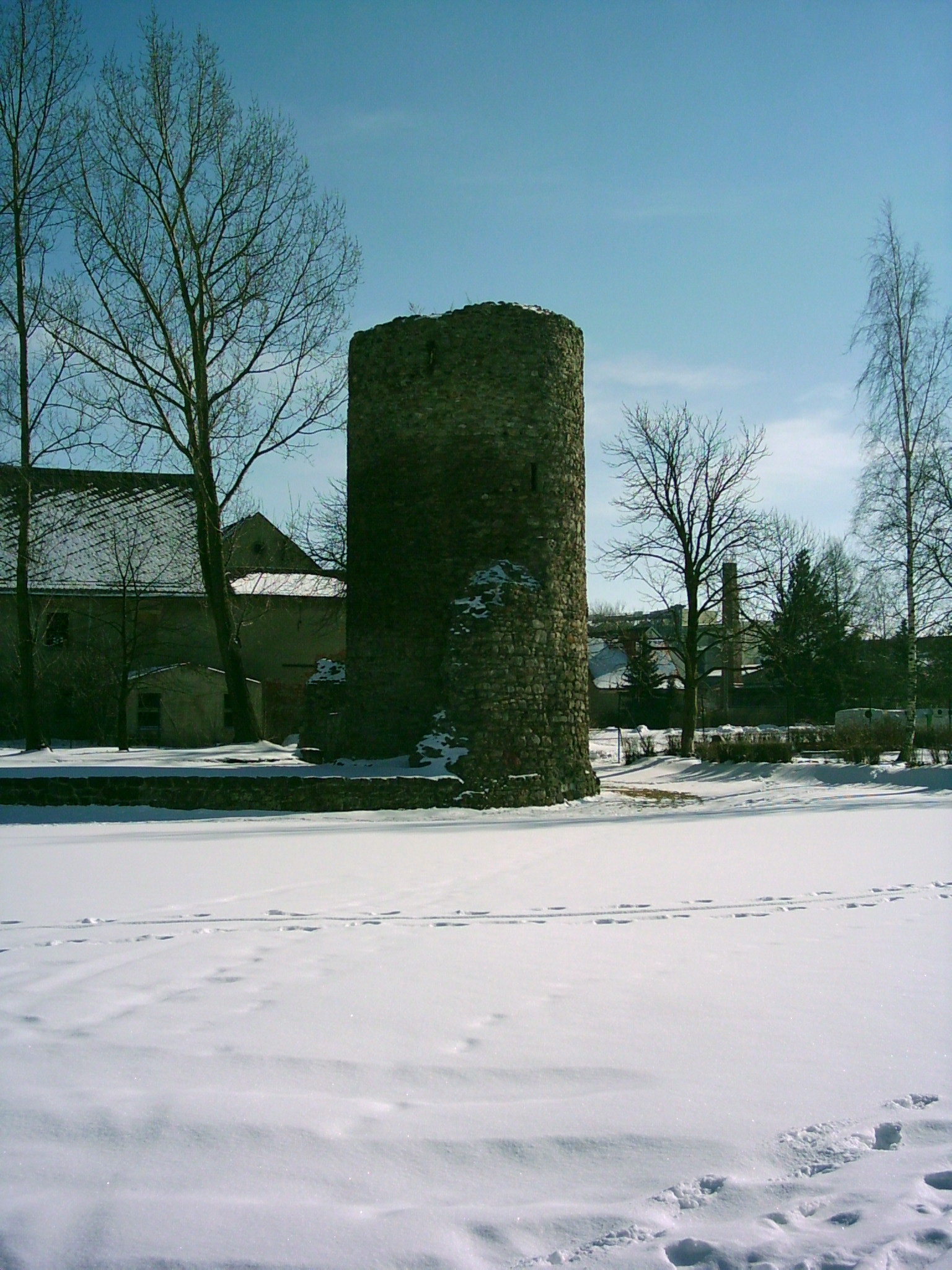 Der Bergfried der Ruine der Wasserburg Ruppendorf Winter 2006